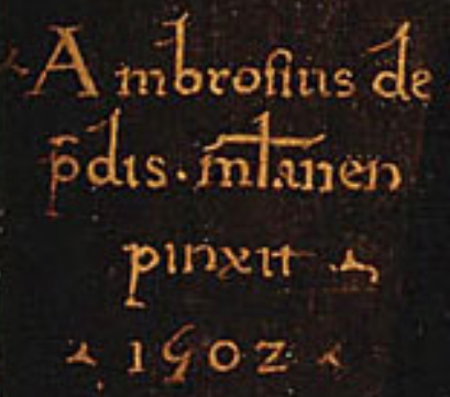 Un texte disant « Ambrosius de Pds Mlanen pinxit 1502 »